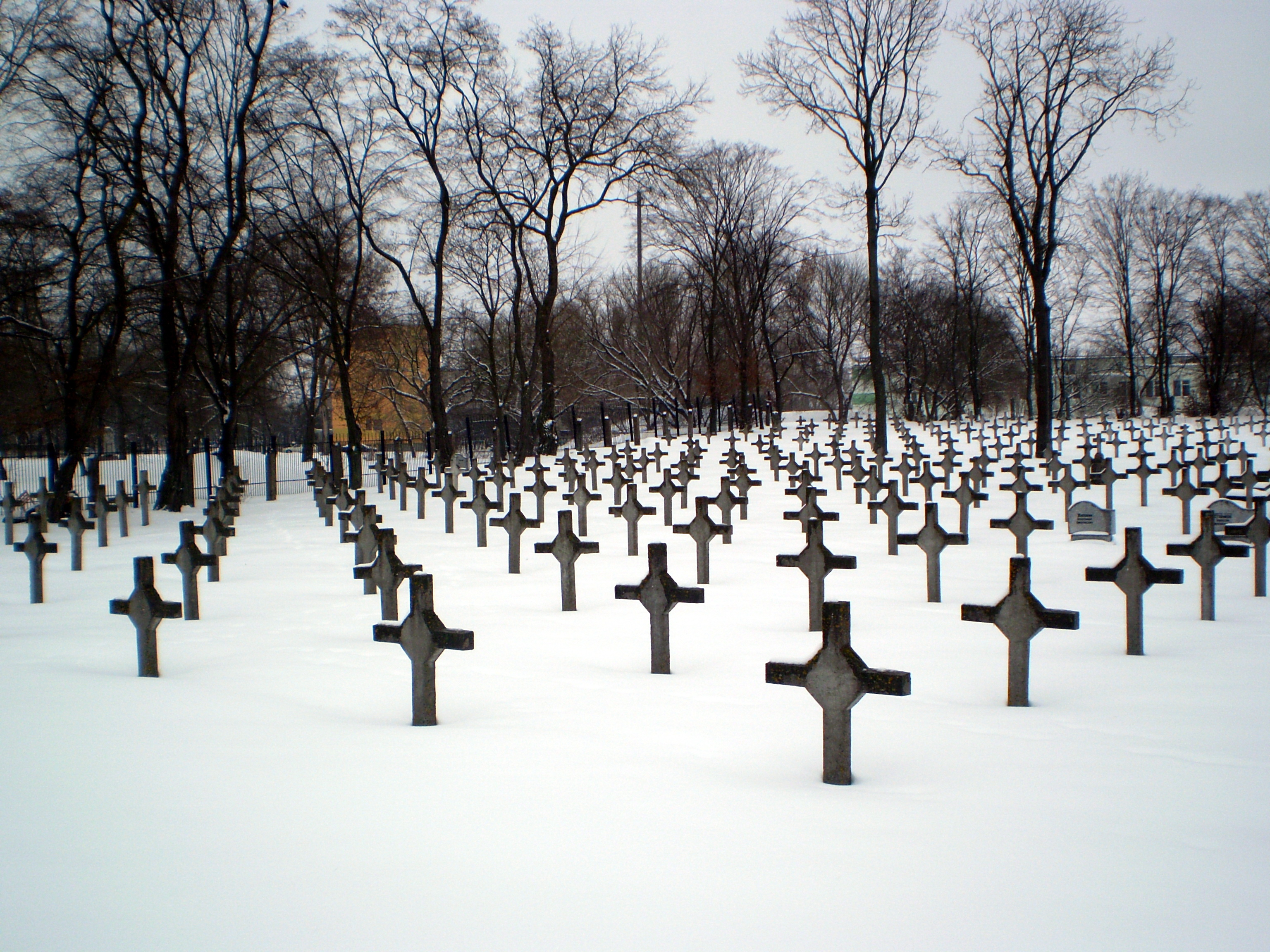 Польскія гарнізонныя могілкі